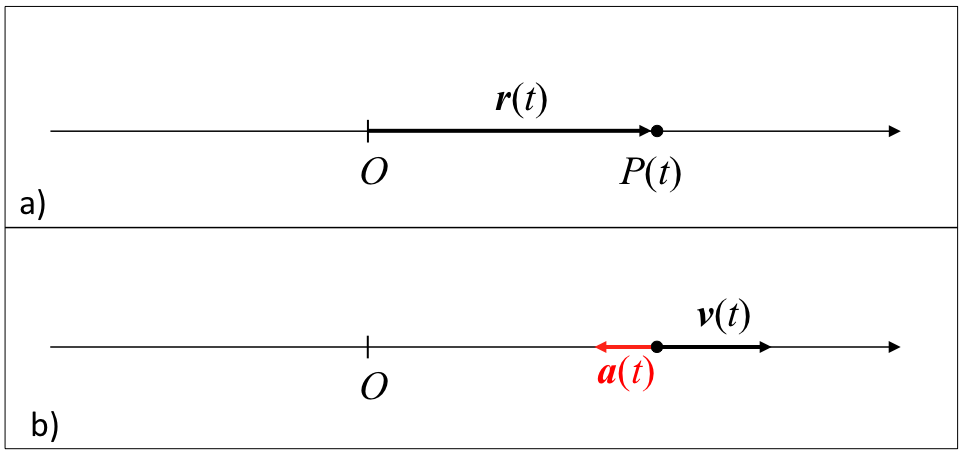 Higidura zuzeneko magniftude fisiko nagusien grafikoa.